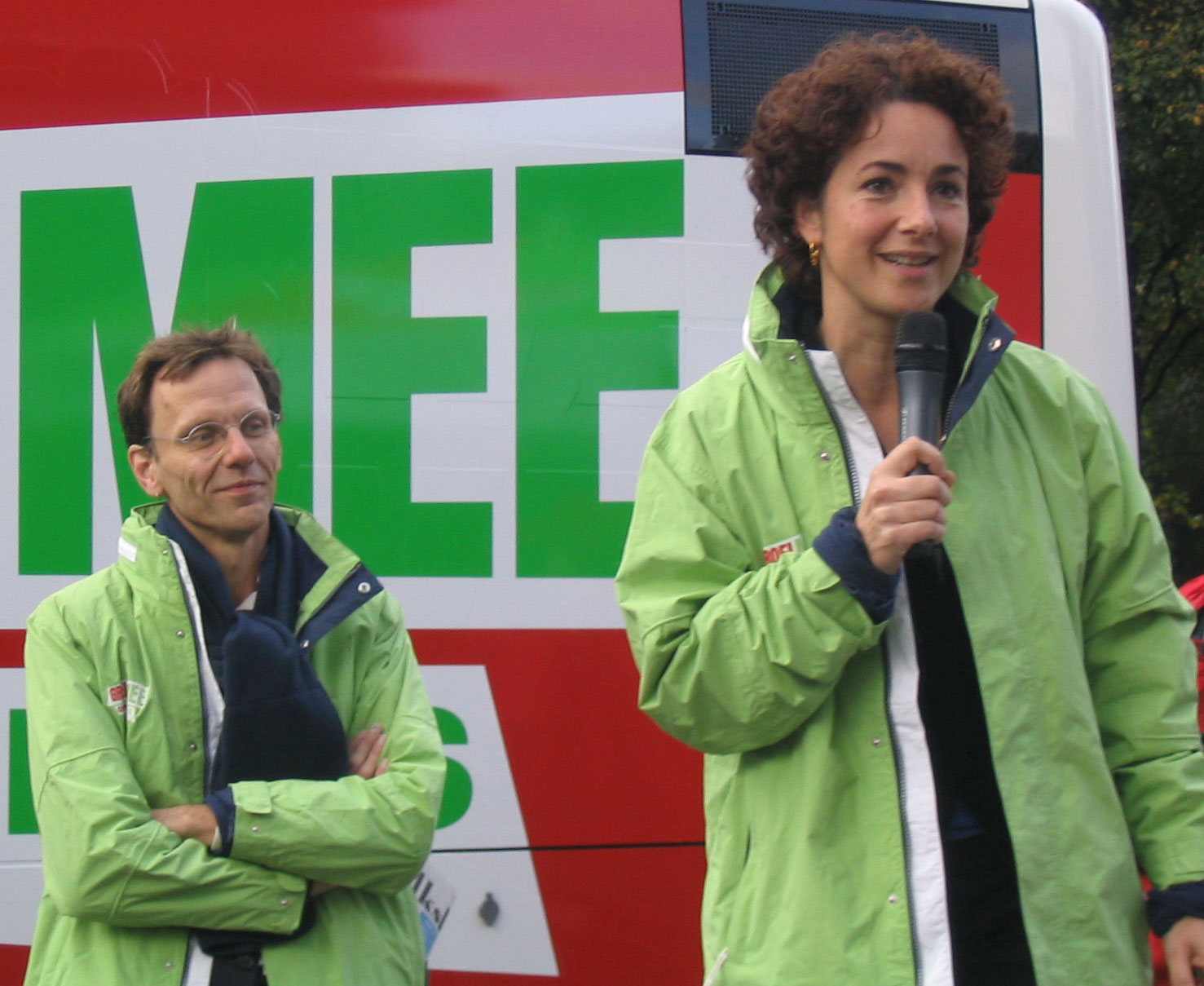 Kees Vendrik and Femke Halsema, GroenLinks politicians, in De Uithof